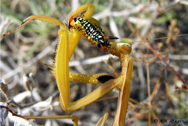 Балка Плоська, Лутугинський район, околиці с. Розкішне